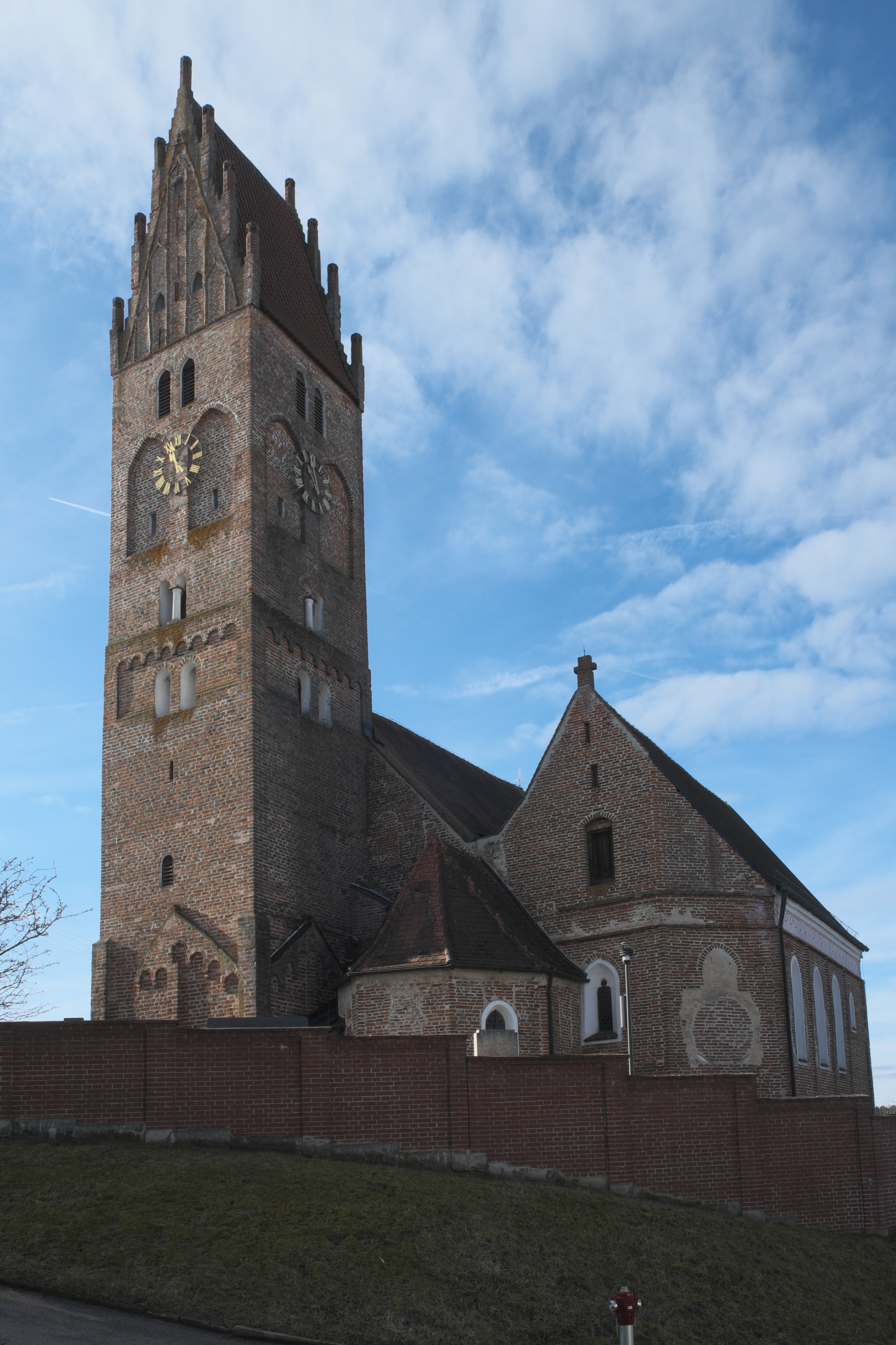 Katholische Kirche St. Peter und Paul in Ebrantshausen (Mainburg) im niederbayerischen Landkreis Kelheim (Bayern/Deutschland)